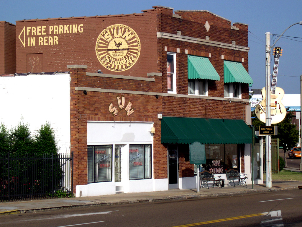 Sun Studios, Memphis, 2006